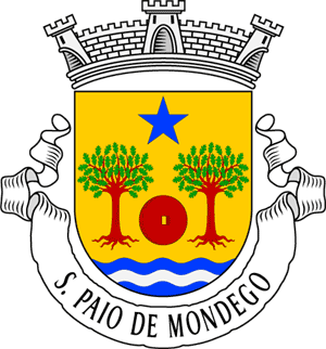 Brasão de Armas de São Paio de Mondego